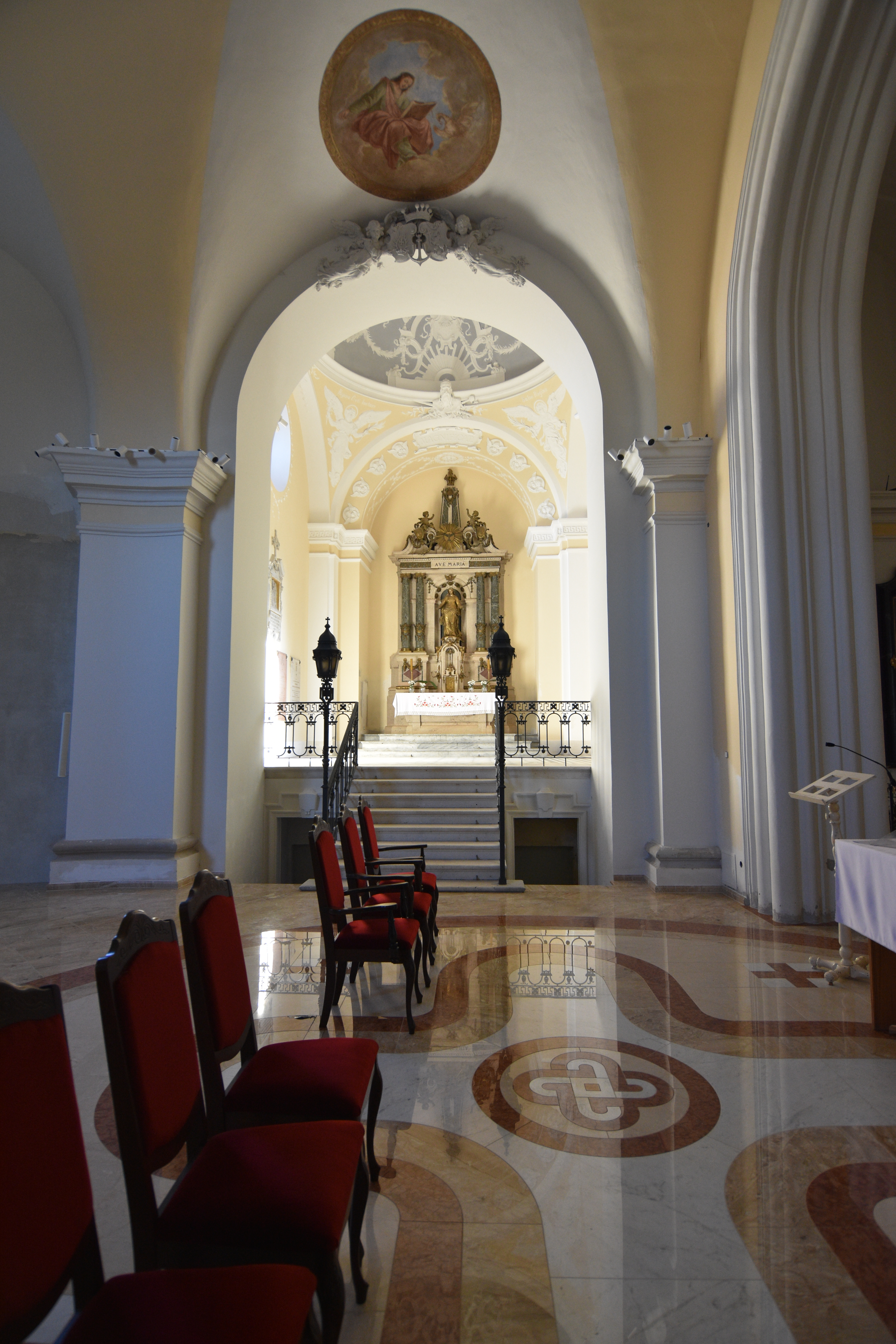 Saint Ladislaus church in Beltinci Interior